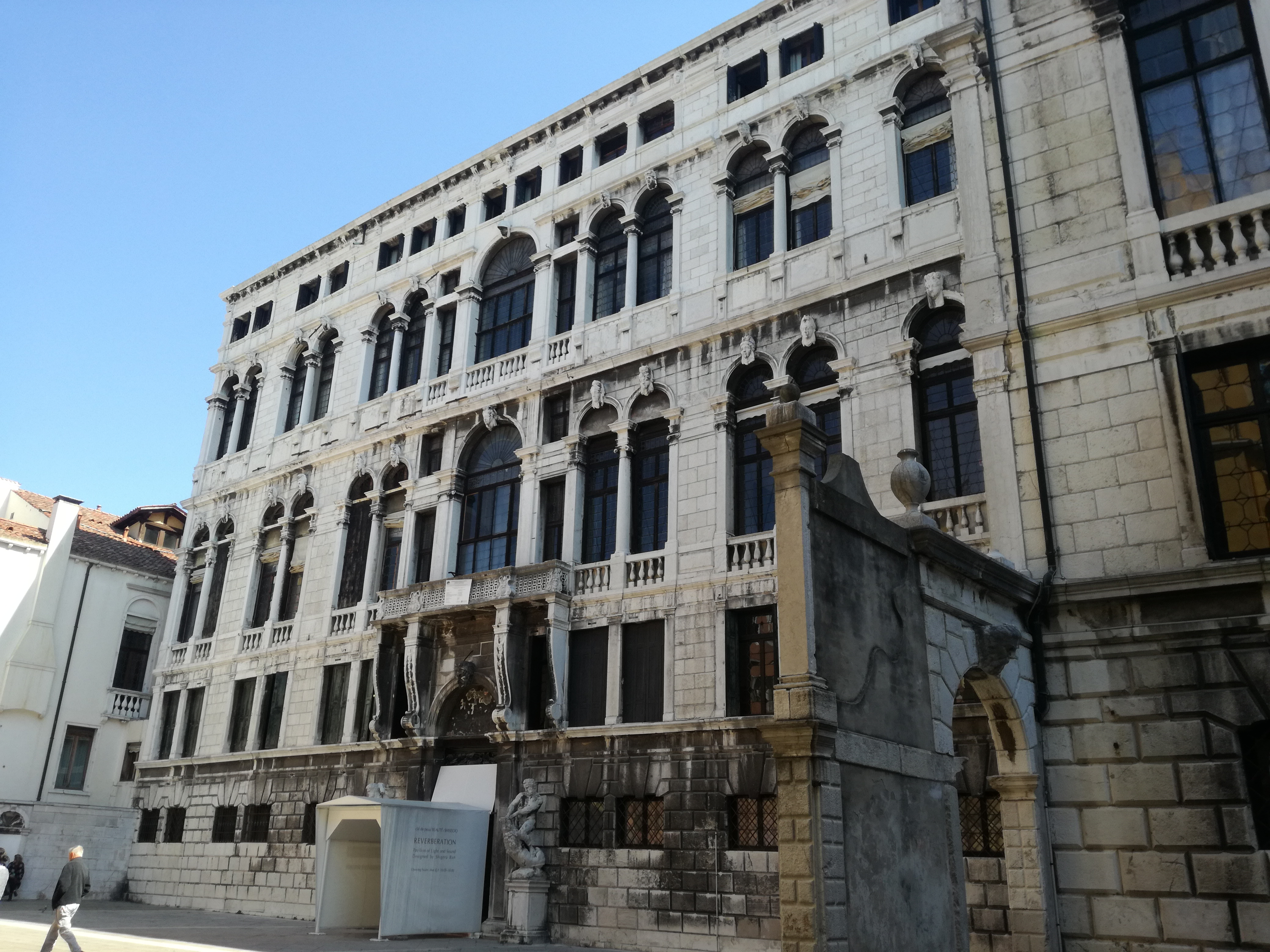 Palazzo Pisani a Santo Stefano a Venezia, sede del Conservatorio Benedetto Marcello